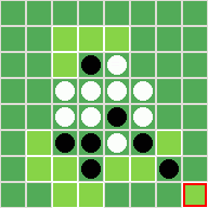 voorbeeld van spel reversie, eigen plaatje gemaakt met wat hulp van GNU programma YABO4G (